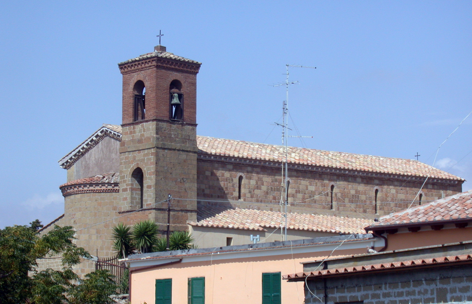 Italia, Lazio, provincia di Roma, Ardea: vista della chiesa di San Pietro Apostolo